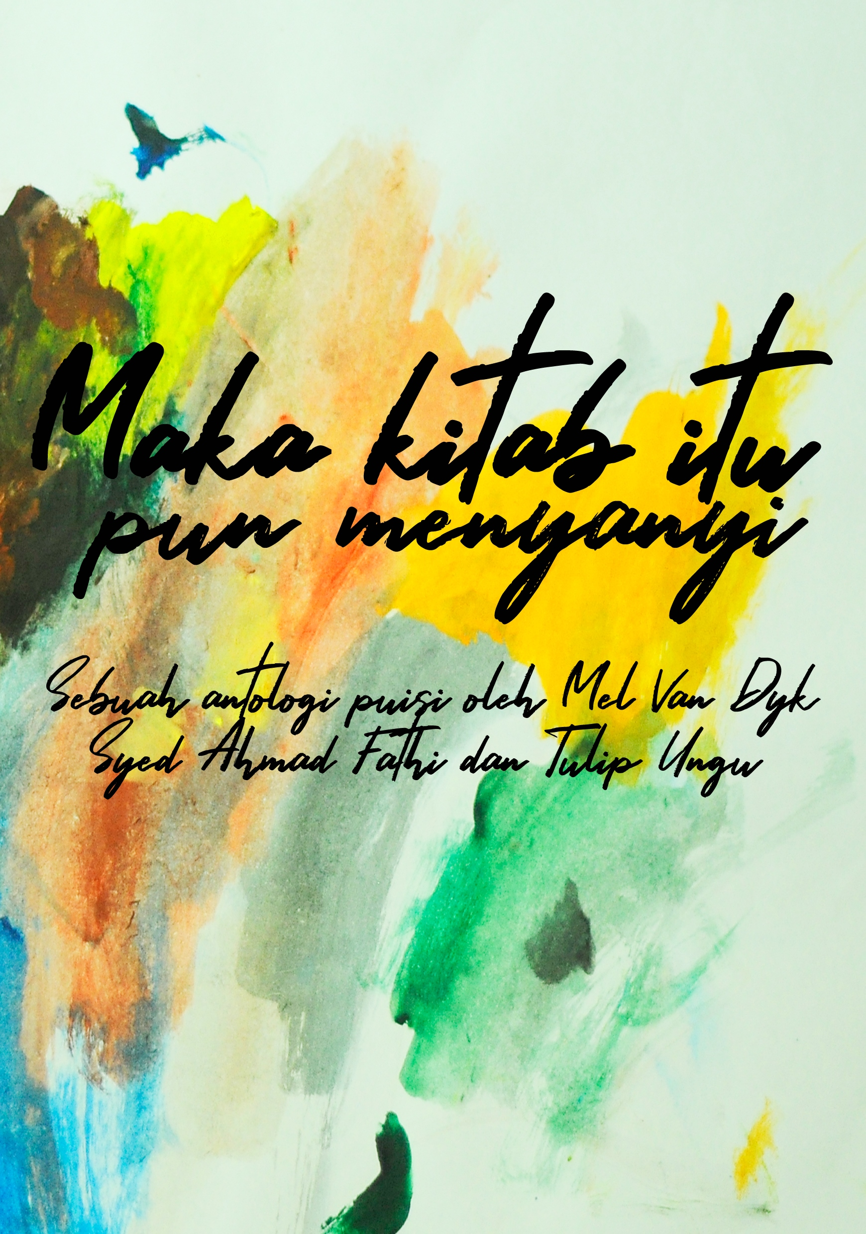 Antologi Puisi Maka Kitab Itu Pun Menyanyi